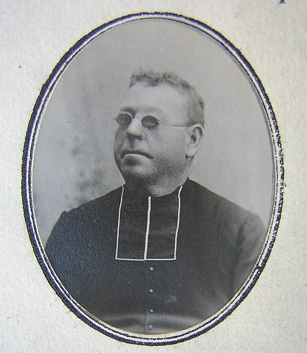 Virgile Multier, curé d'Andilly